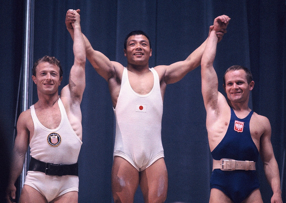 Isaac Berger, Yoshinobu Miyake, Mieczysław Nowak, 1964 Olympics